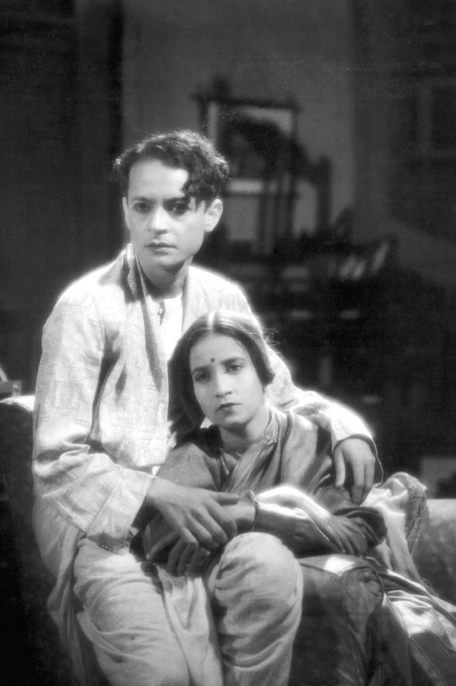 P.C. Barua et Jamuna dans la version bengalie de Devdas (1935)